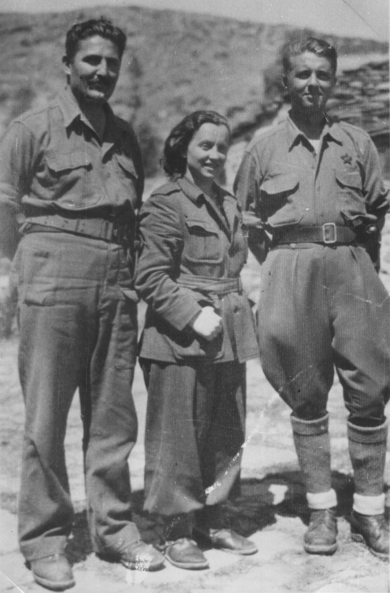 Srpskohrvatski / српскохрватски: Miladin Popović, nepoznata partizanka i Enver Hodža